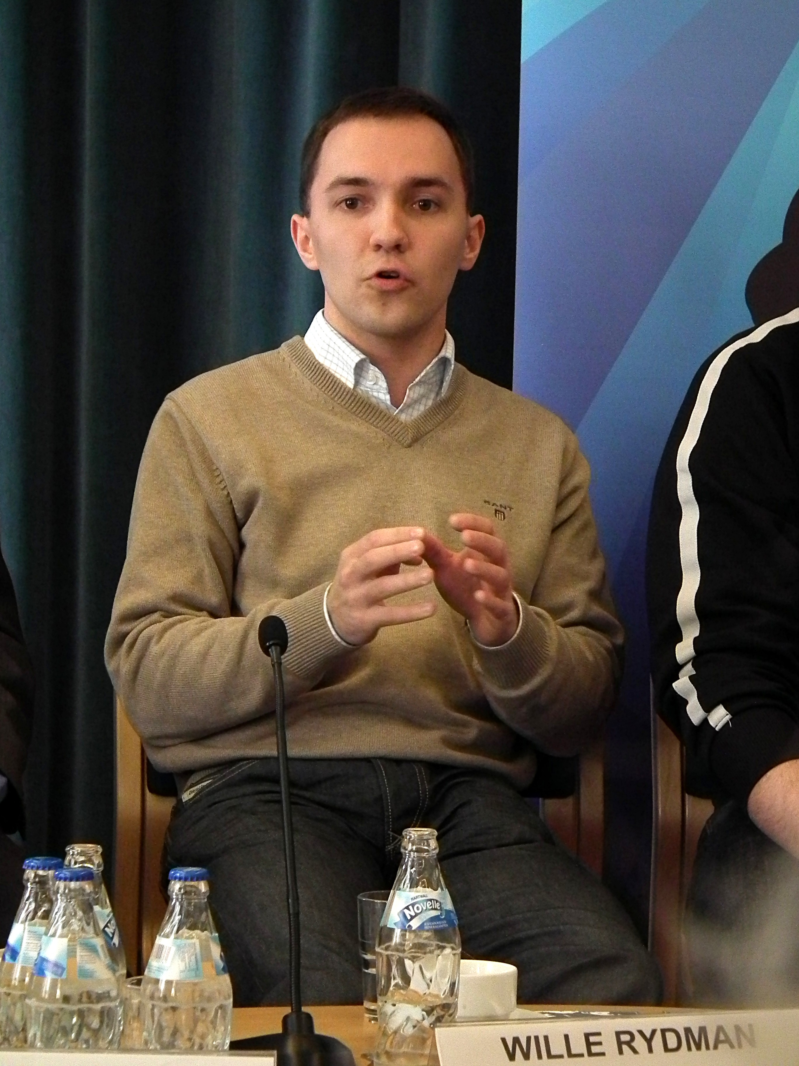 Finnish politician Wille Rydman